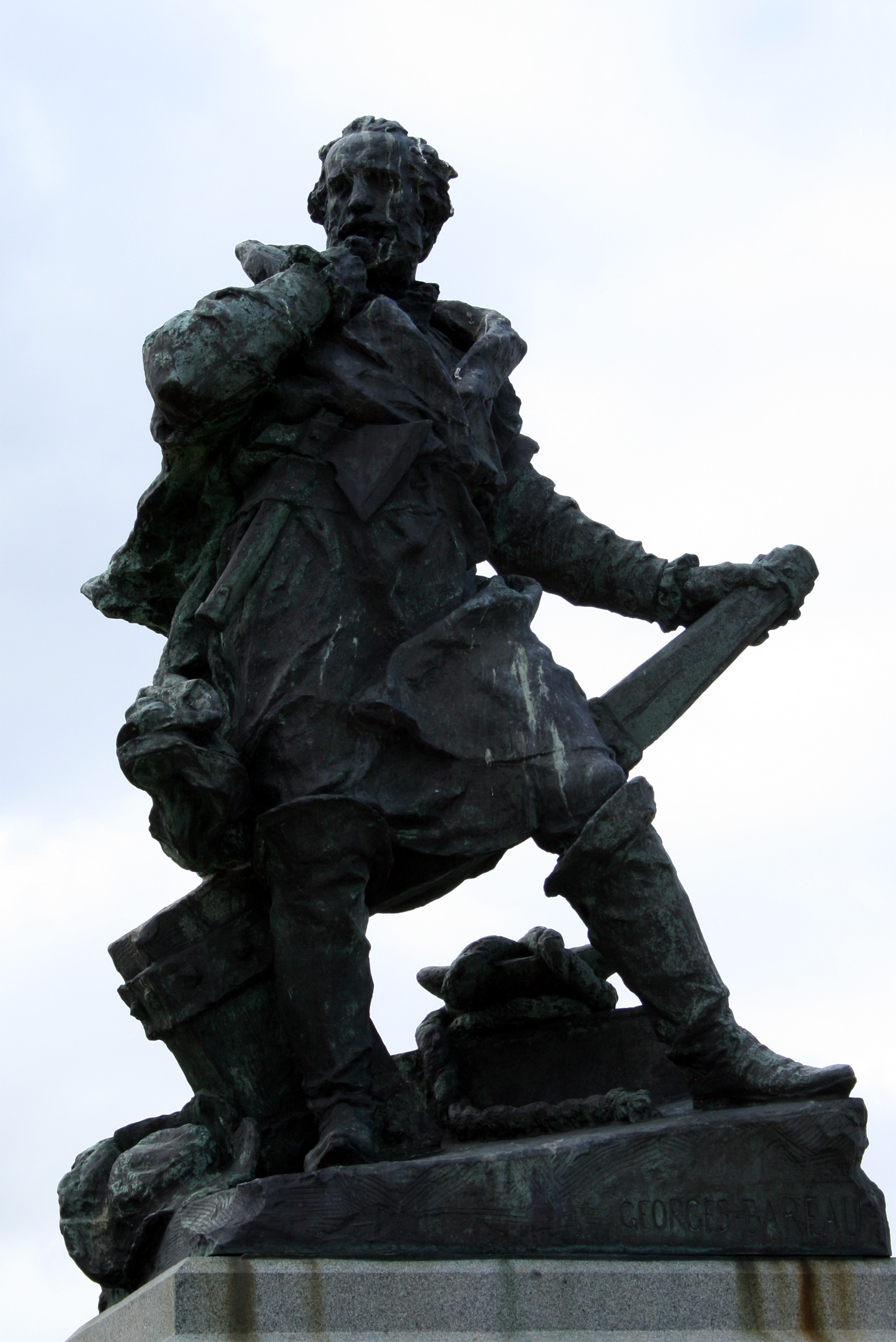 Statue de Jacques Cartier à Saint-Malo.